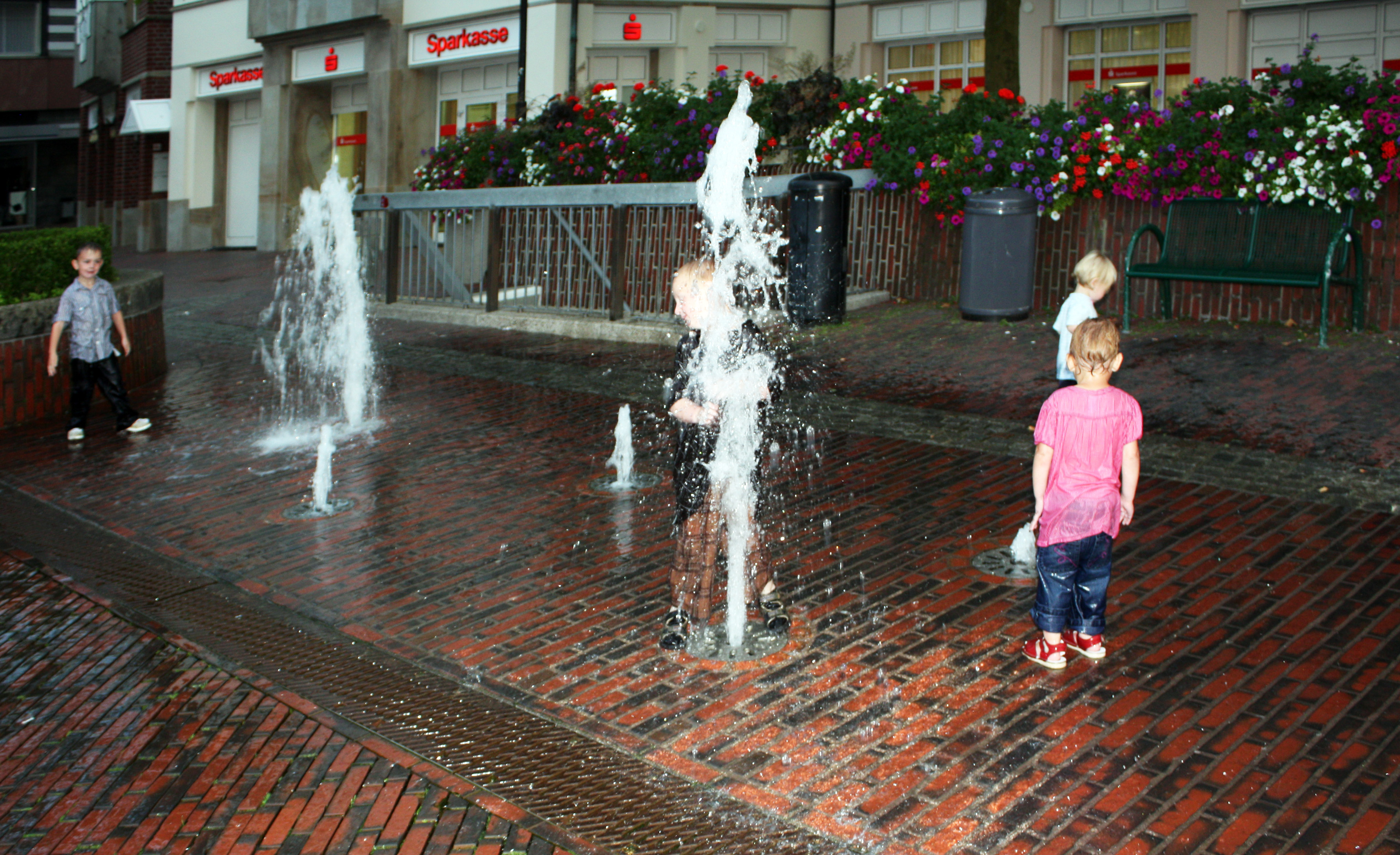 Lingen, Marktbrunnen